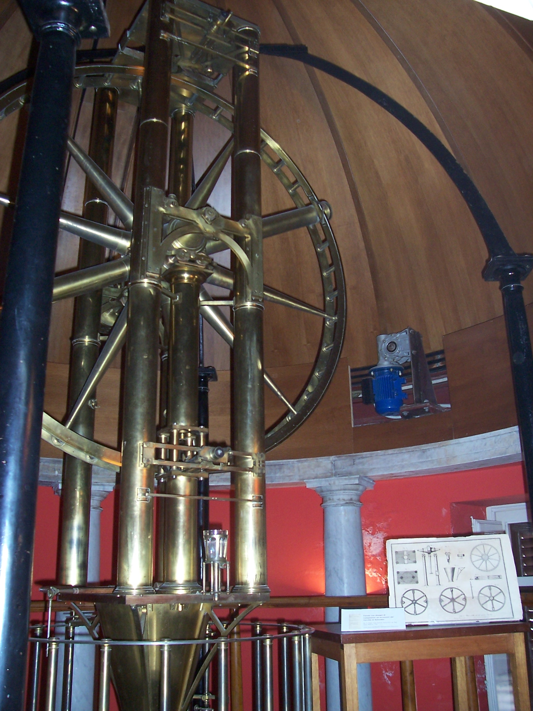 Strumento ottico, all'osservatorio astronomico del Palazzo dei Normanni, Palermo